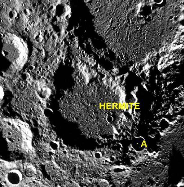 Cráter lunar Hermite. Cráteres satélite. (Imagen LROC)